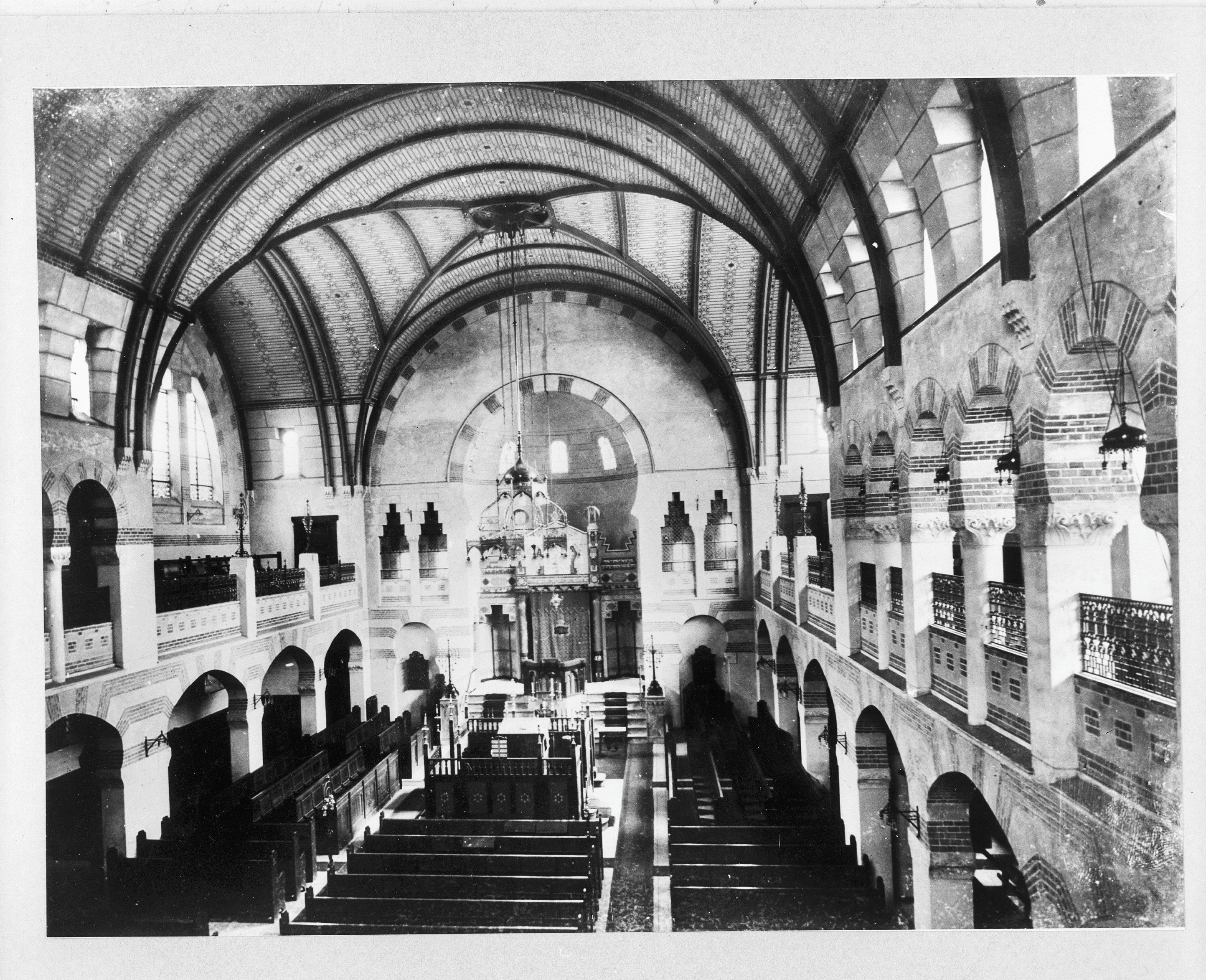 Synagoge: Interieur van de synagoge te Groningen, reproductie